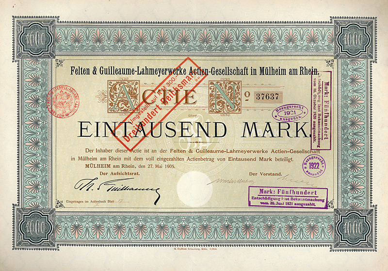 Aktie über 1000 Mark der Felten & Guillaume-Lahmeyerwerke AG vom 27. Mai 1905